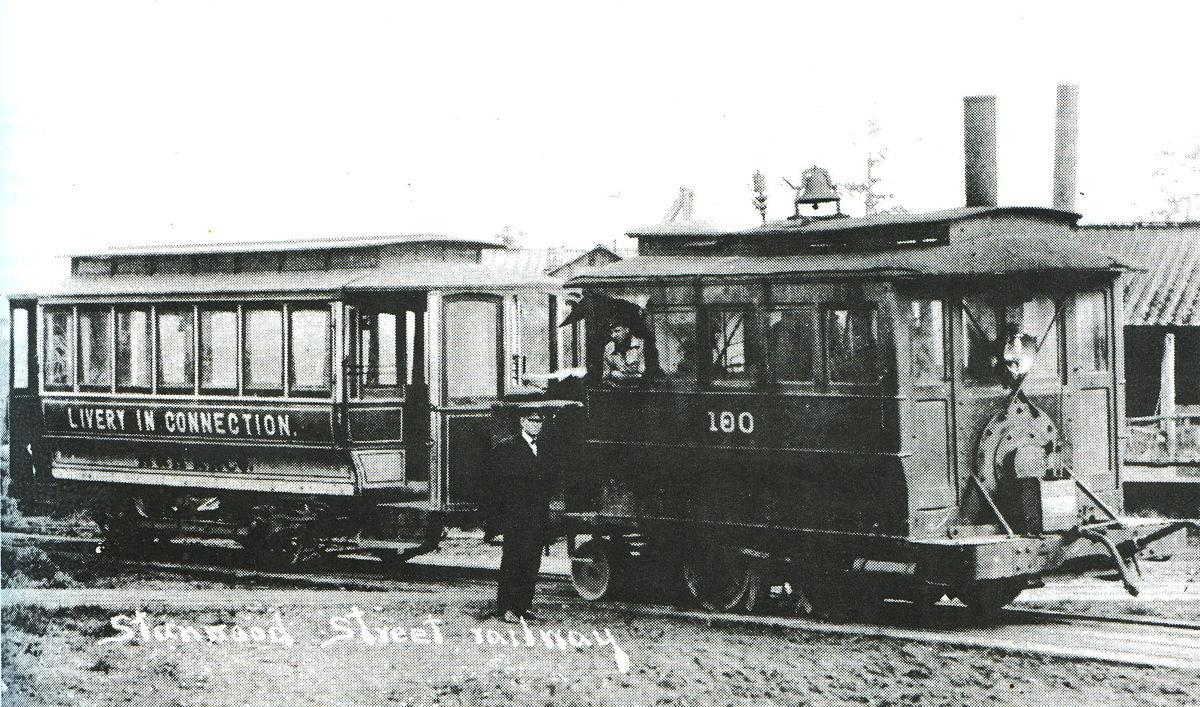 H & H Railroad - Stanwood Street Railway - "Livery in Connection"